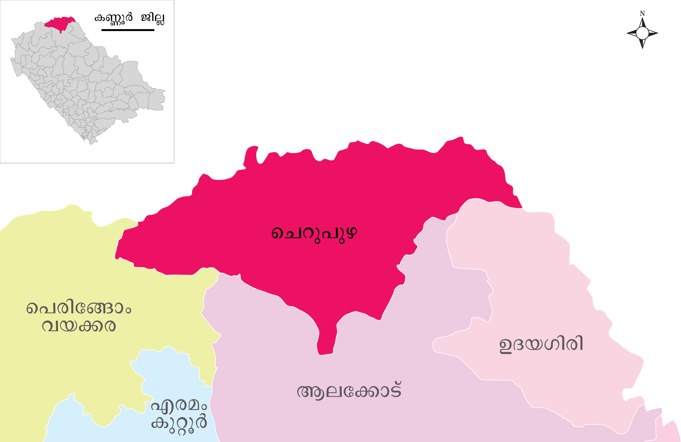 കണ്ണൂർ ജില്ലയിലെ ചെറുപുഴ ഗ്രാമം